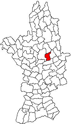 Categorie:Hărţi ale judeţului Olt